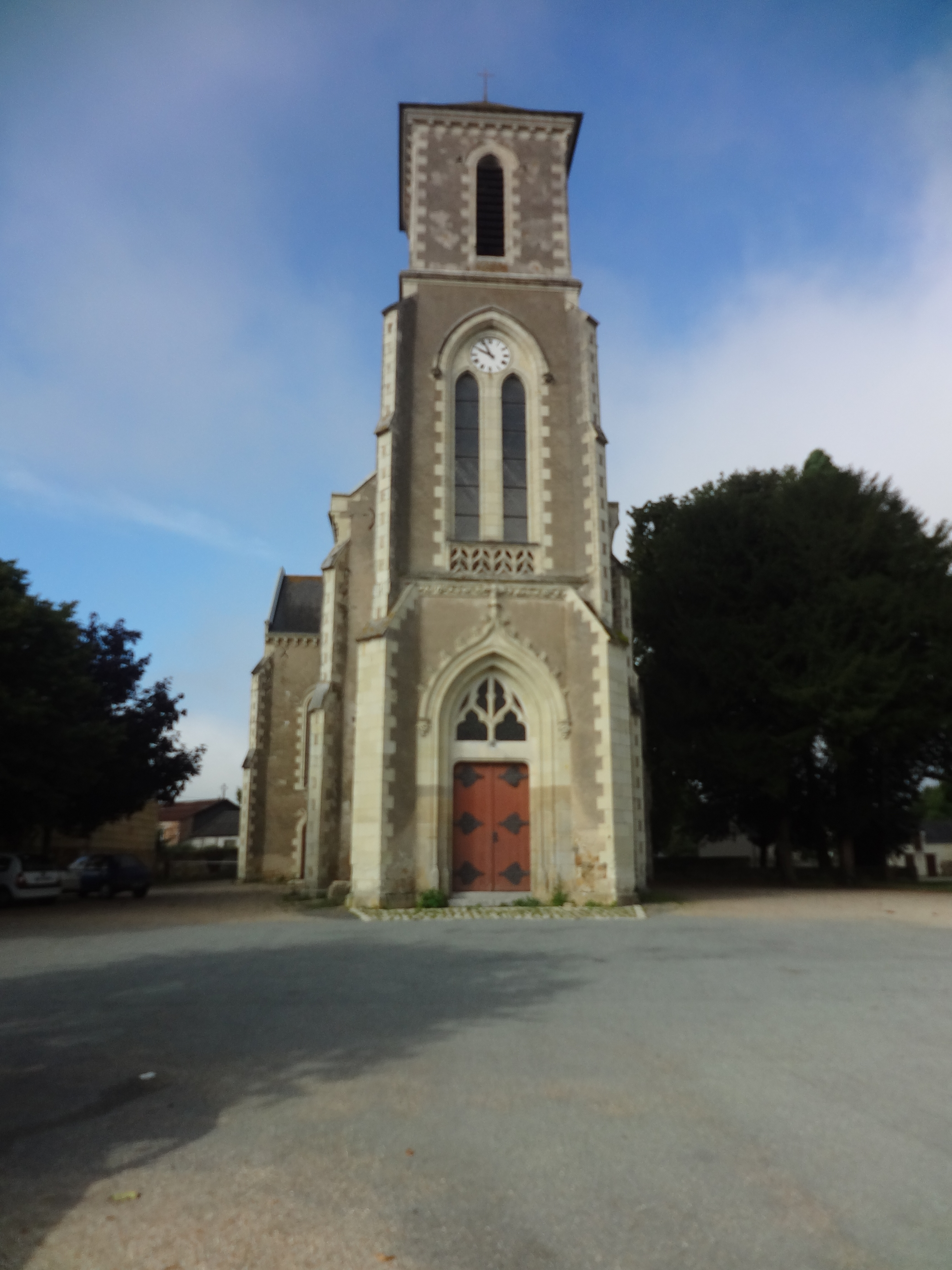 Église paroissiale Saint-Aubin des Alleuds (Maine-et-Loire, France).